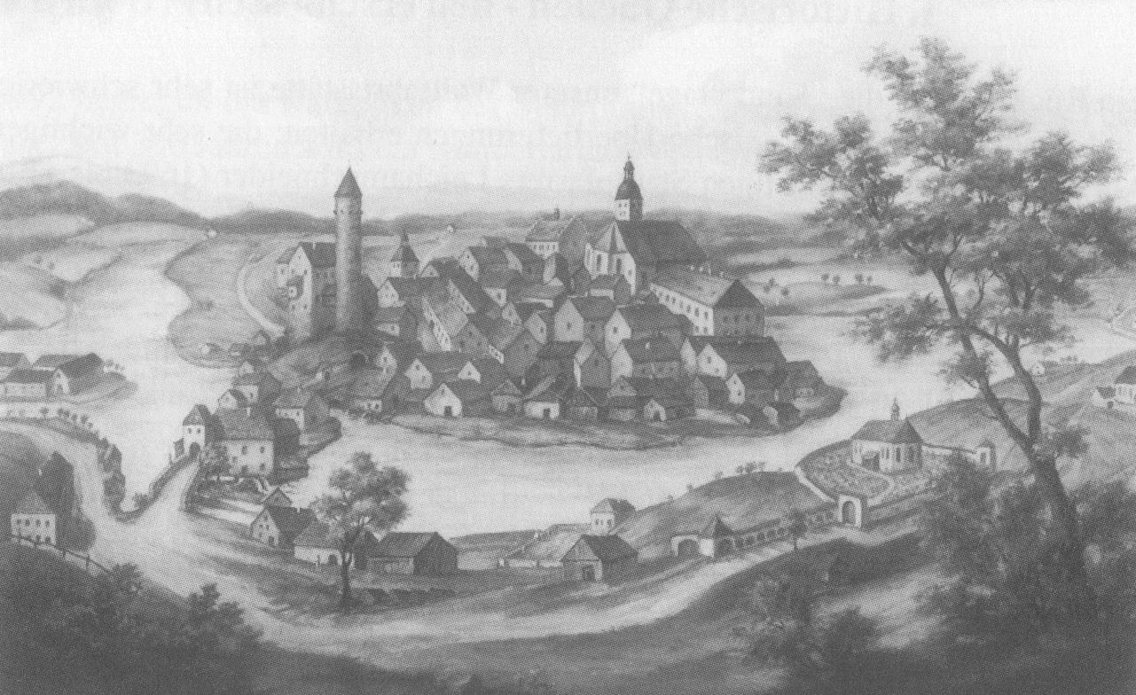 Tirschenreuth um 1700